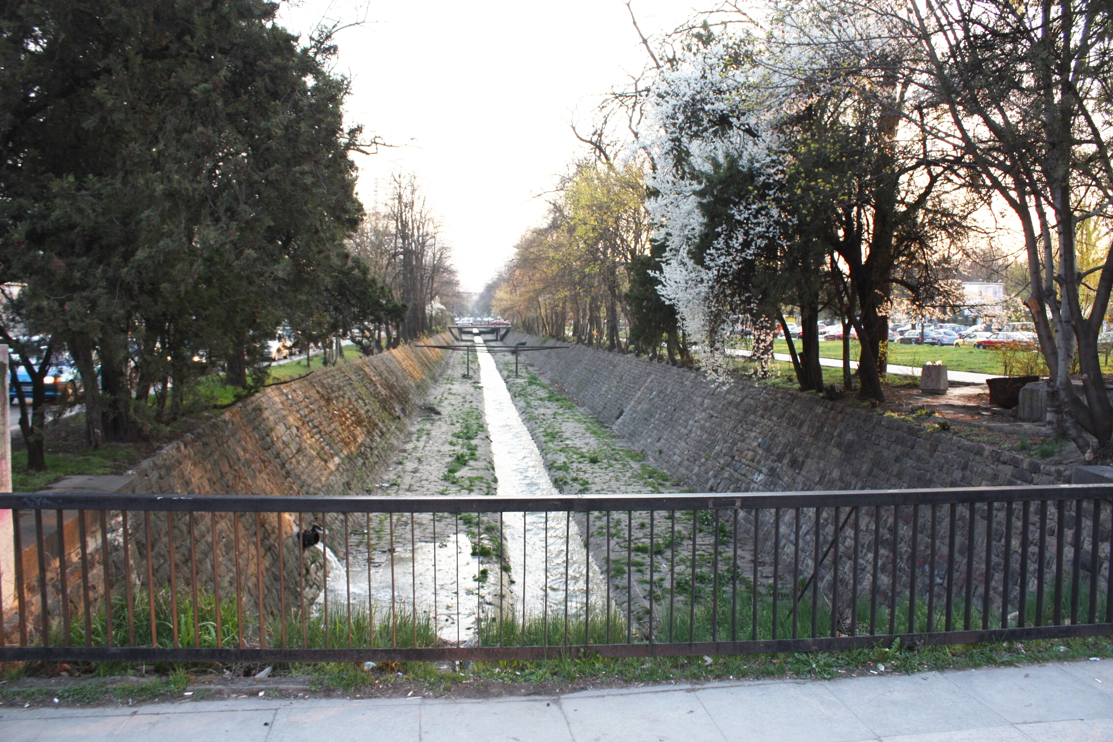 Adlerbrücke, Orlov most, Орлов мост, Sofia, Bulgaria